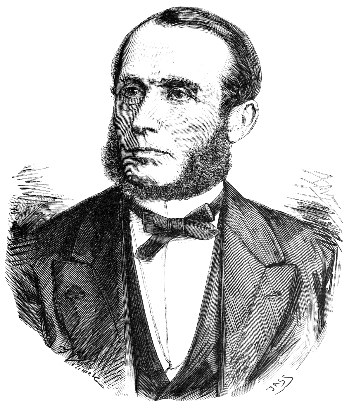 Portrait of Yakov Karlovich Grot (Яков Карлович Грот, 1812 - 1893), Russian philoloist